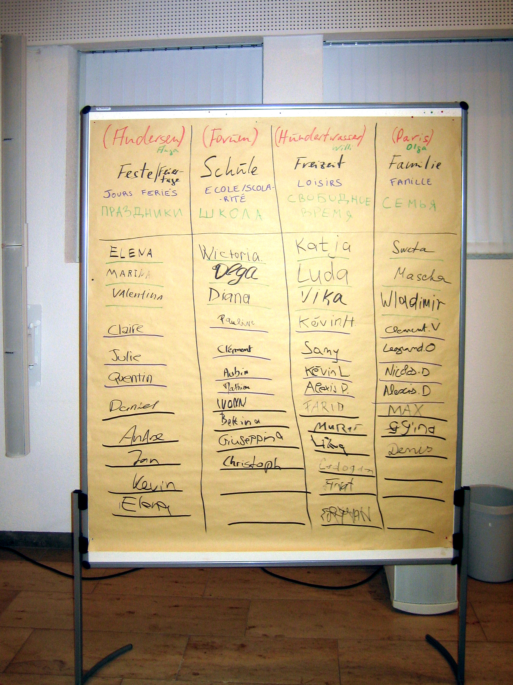 Académie Européenne d'Otzenhausen - Répartition des participants allemands, français et russes en groupes ou équipes de travail.